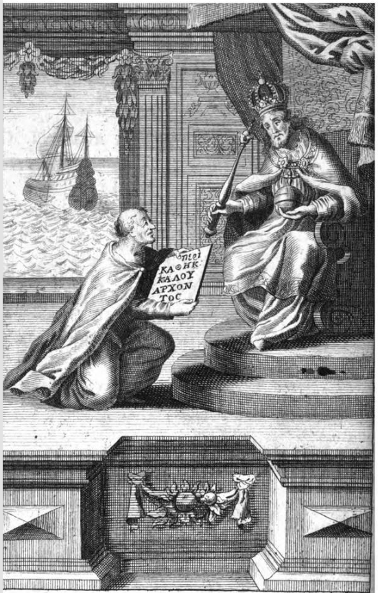 Агапит отдаёт своё сочинение Иустиниану. Издание сочинения 1733 года параллельно на греческом и латинских языках.